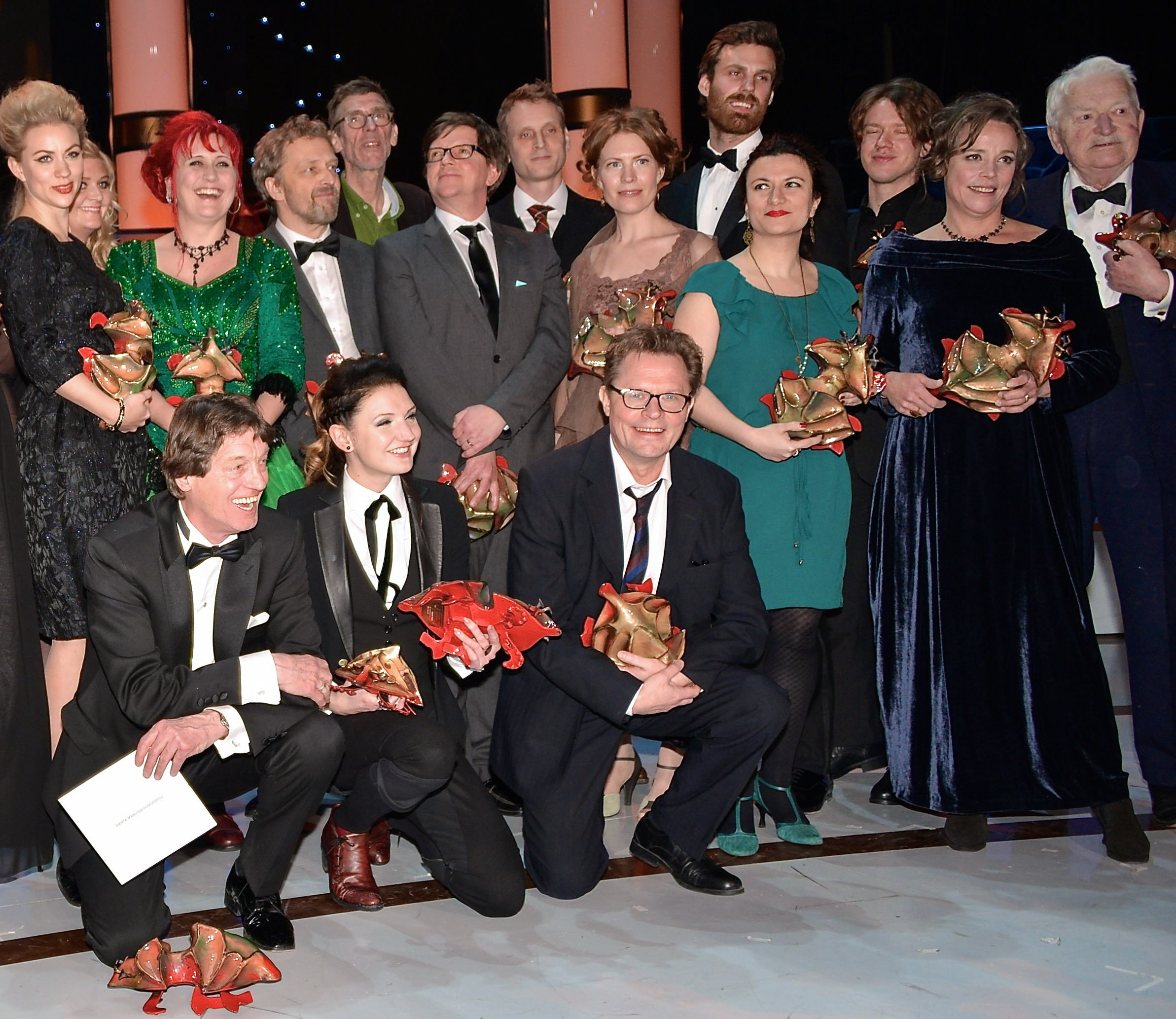 Några av Guldbaggevinnarna den 21 januari 2013.